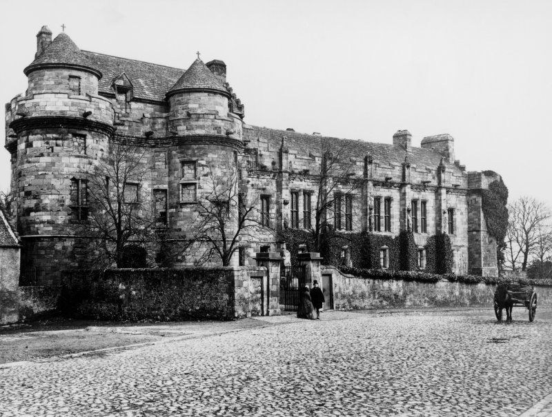 Falkland Palace, Torhaus und Südflügel